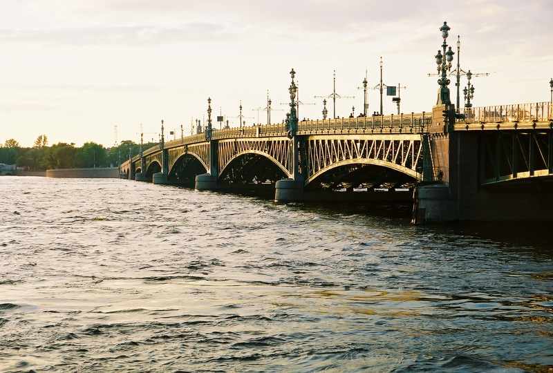 Troitski sild Peterburis.